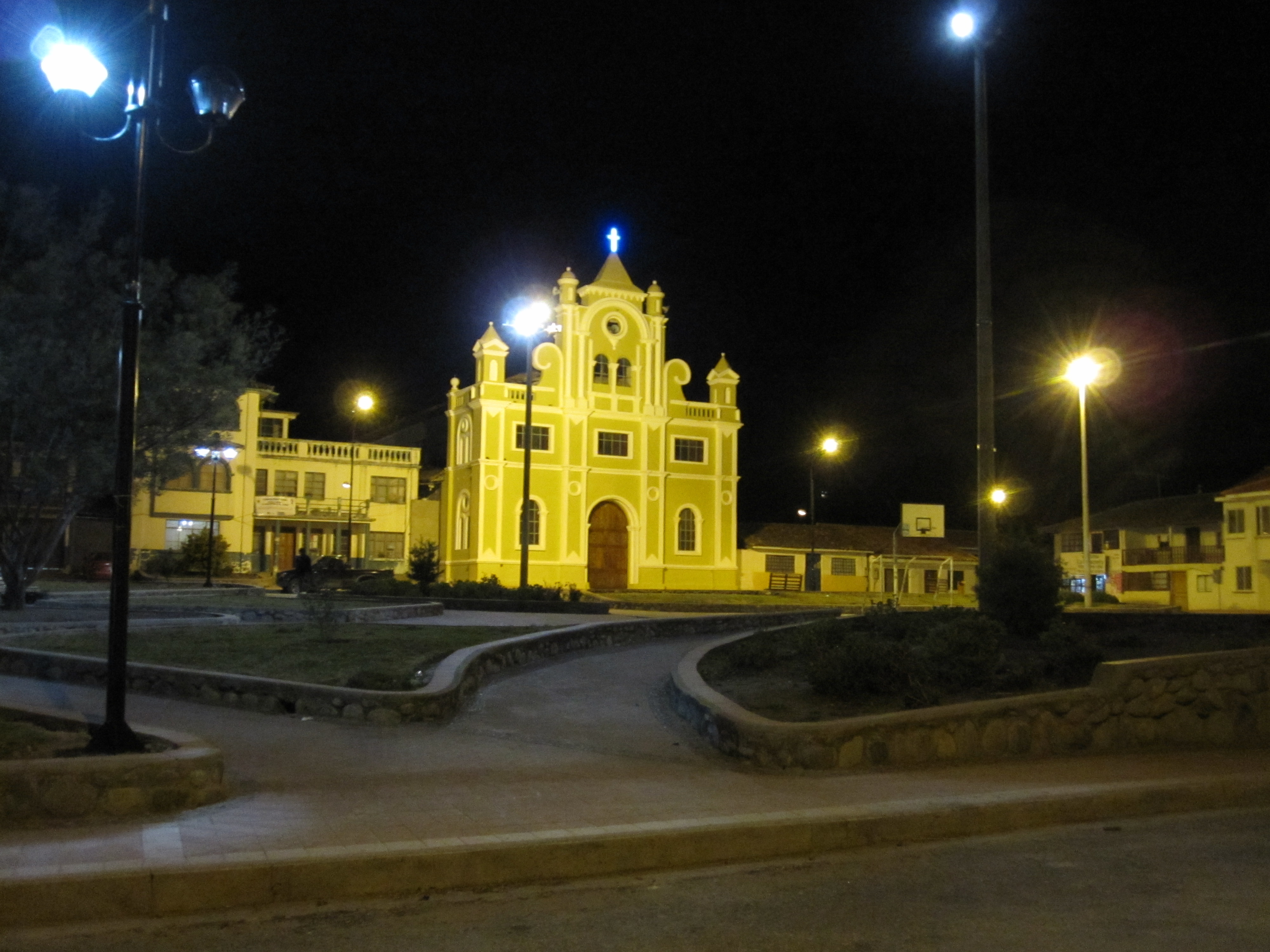 Church in Tarqui, Ecuador (near Cuenca)